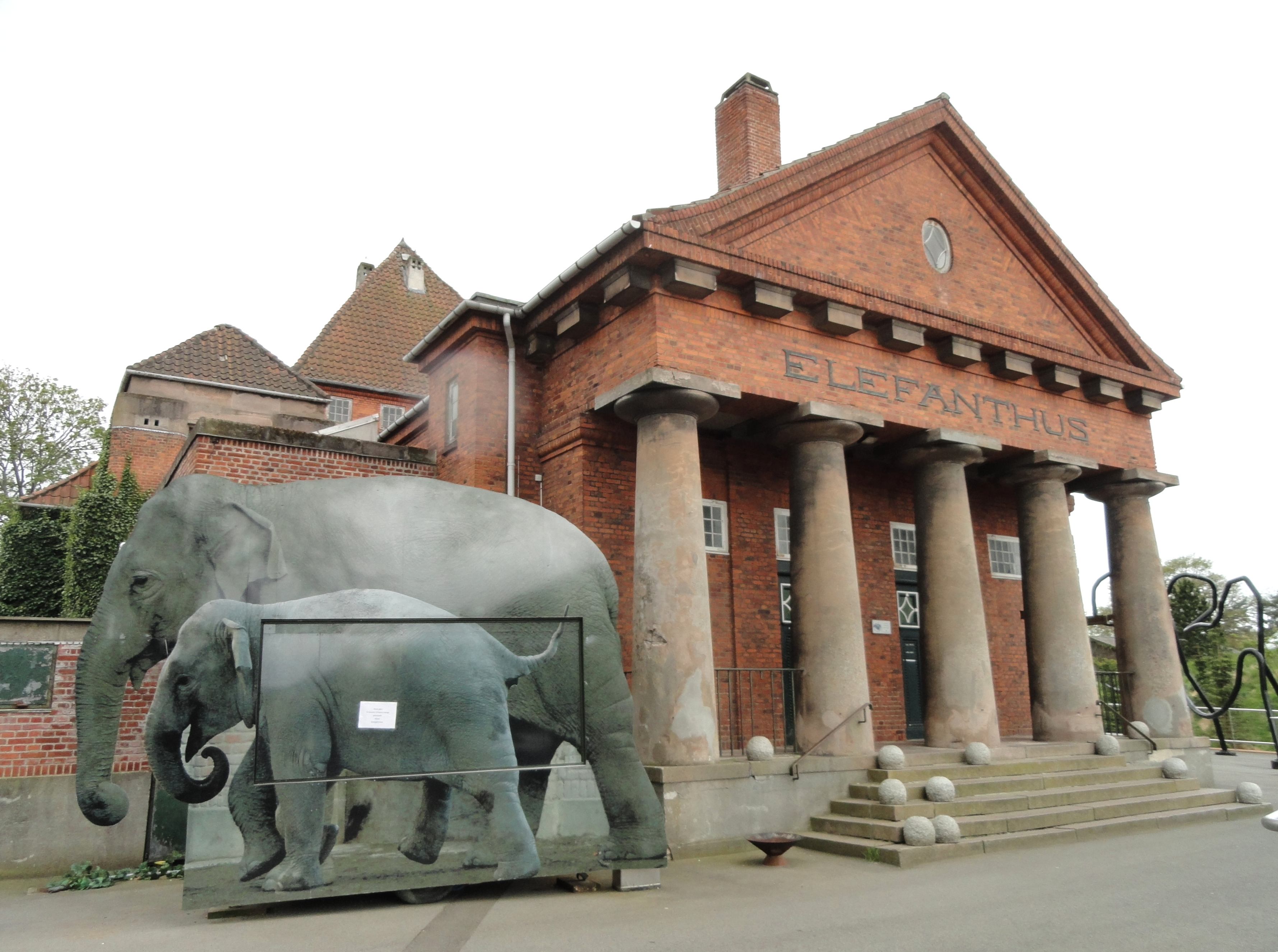 Copenhagen Zoo, Frederiksberg, Copenhagen, Denmark.